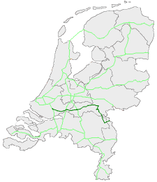 Locatie E31 in Nederland, zelf gemaakt